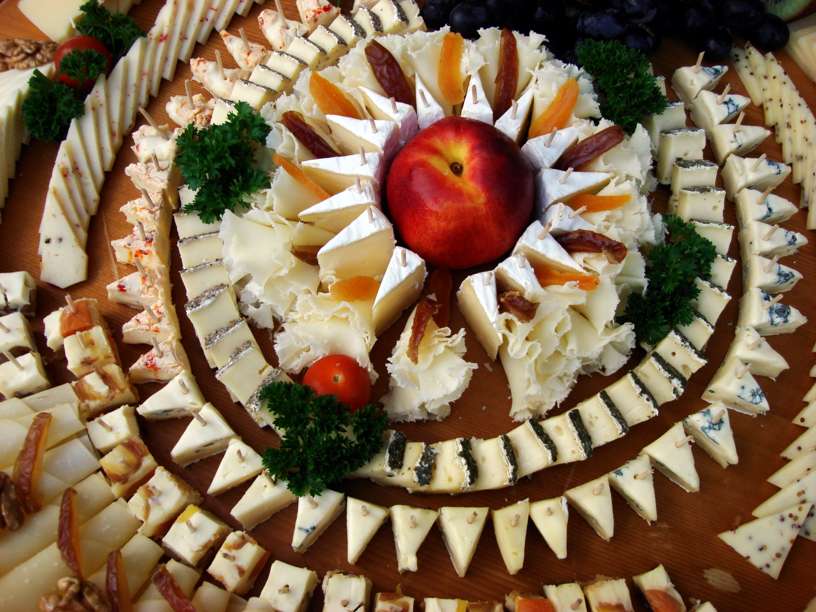 Swiss Cheese